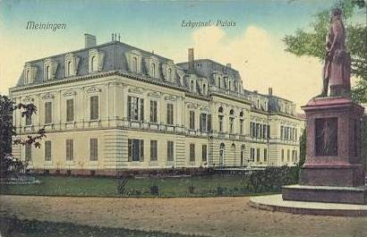 Großes Palais in Meiningen